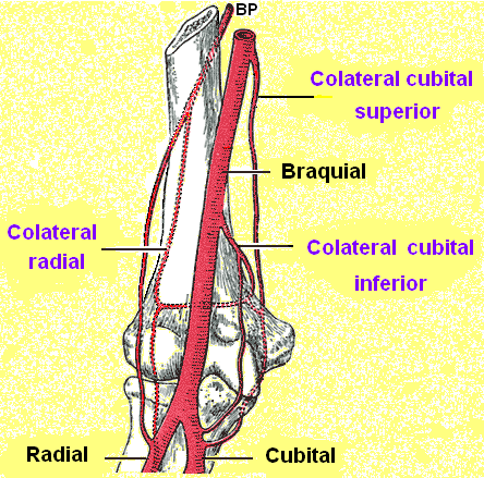 Esquema de las arterias del brazo. Sistema se Colaterales de la arteria Braquial: 1)Colateral radial, 2)Colateral cubital superior y 3)Colateral cubital inferior.